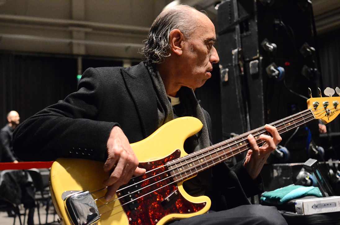 NWR